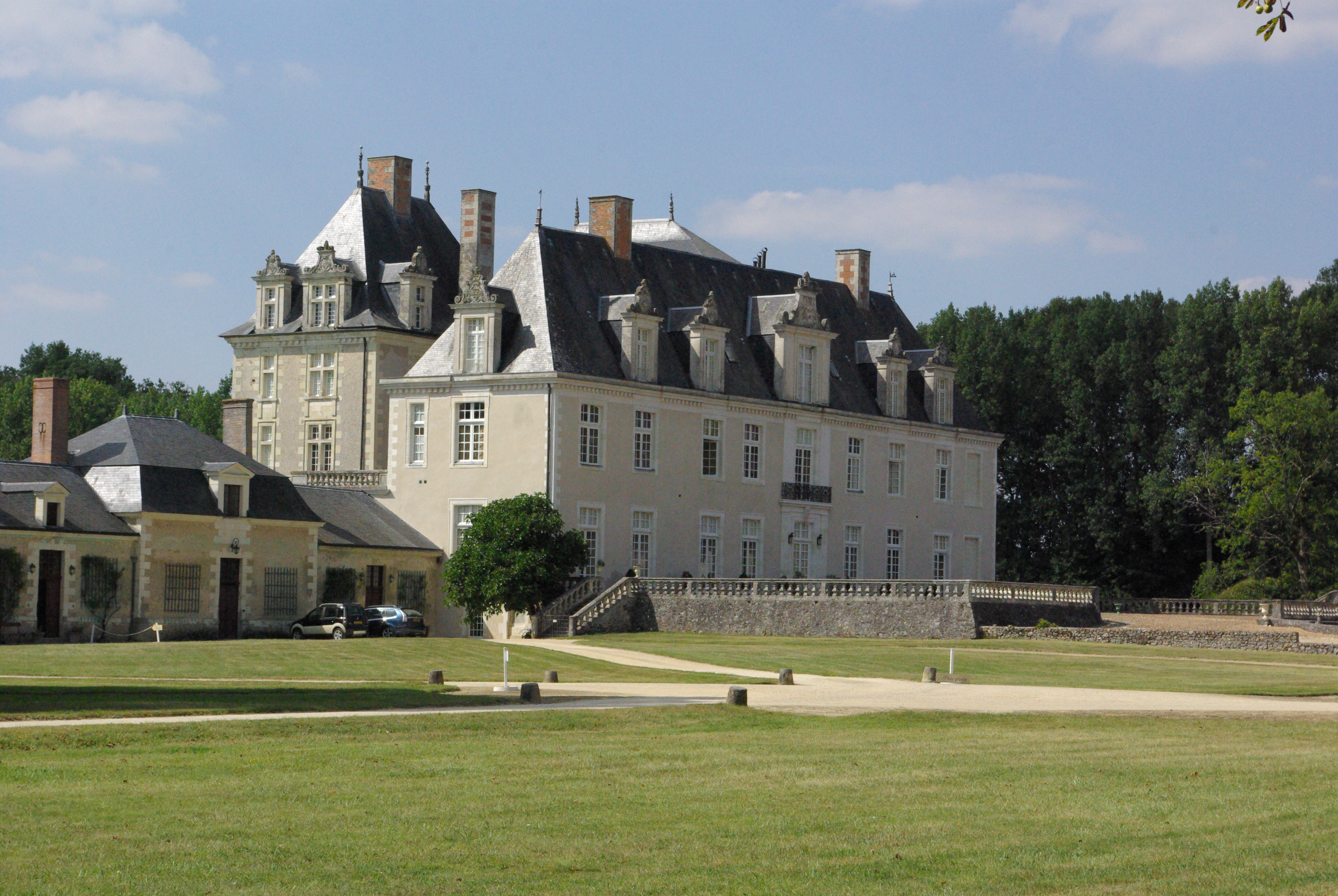 Château de Champchevrier.